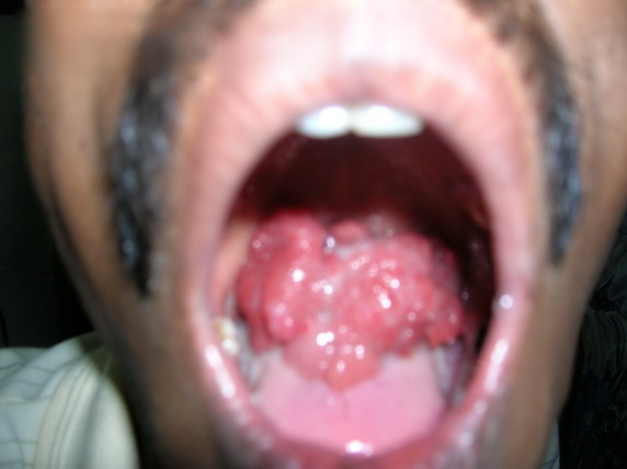 Dr. T. Balasubramanian